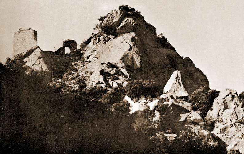 Ruïnes del castell de Rocabertí (la Jonquera, Alt Empordà)